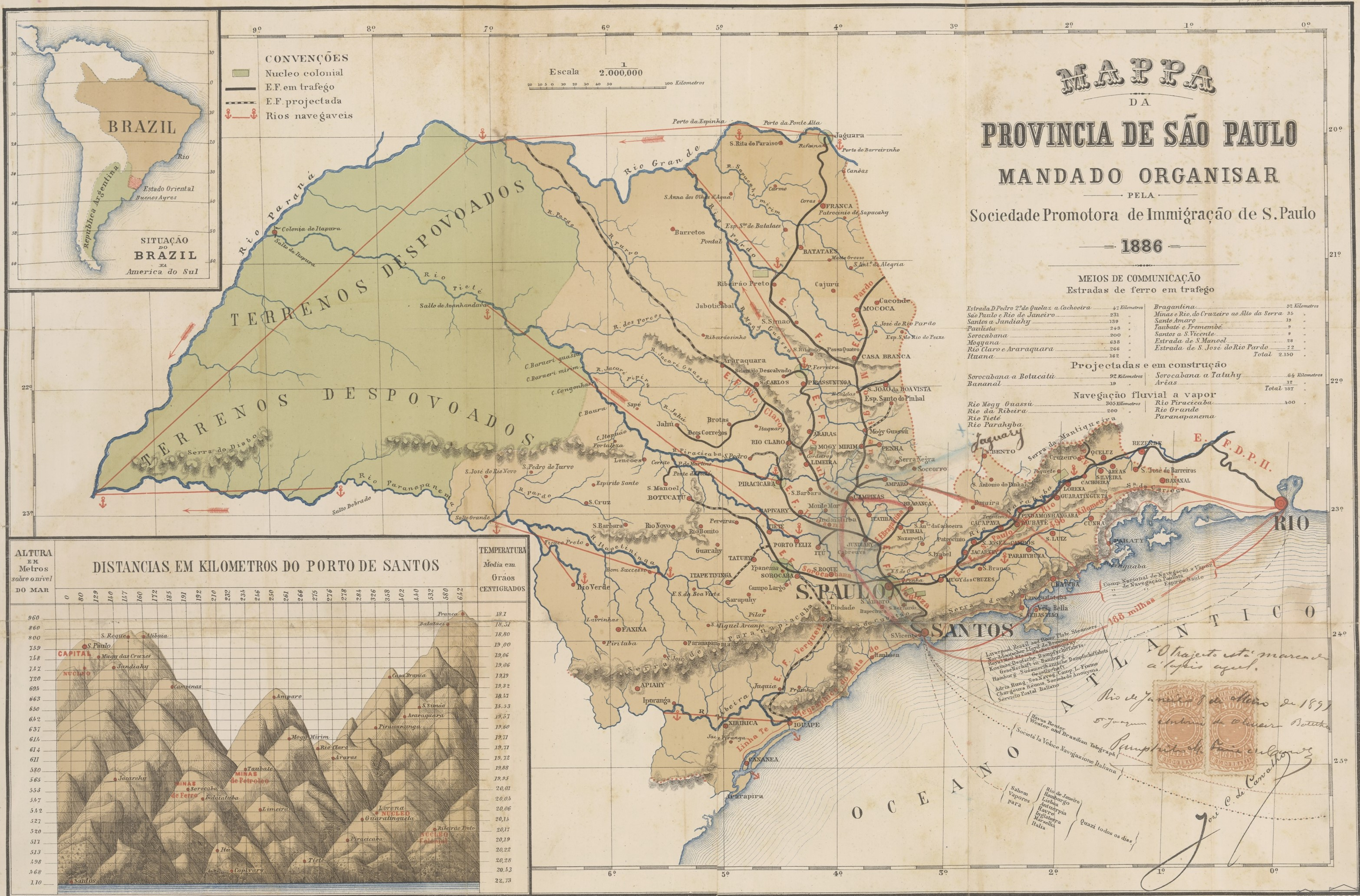 Mapa da Província de São Paulo. Decretos do Poder Executivo – Período Republicano.